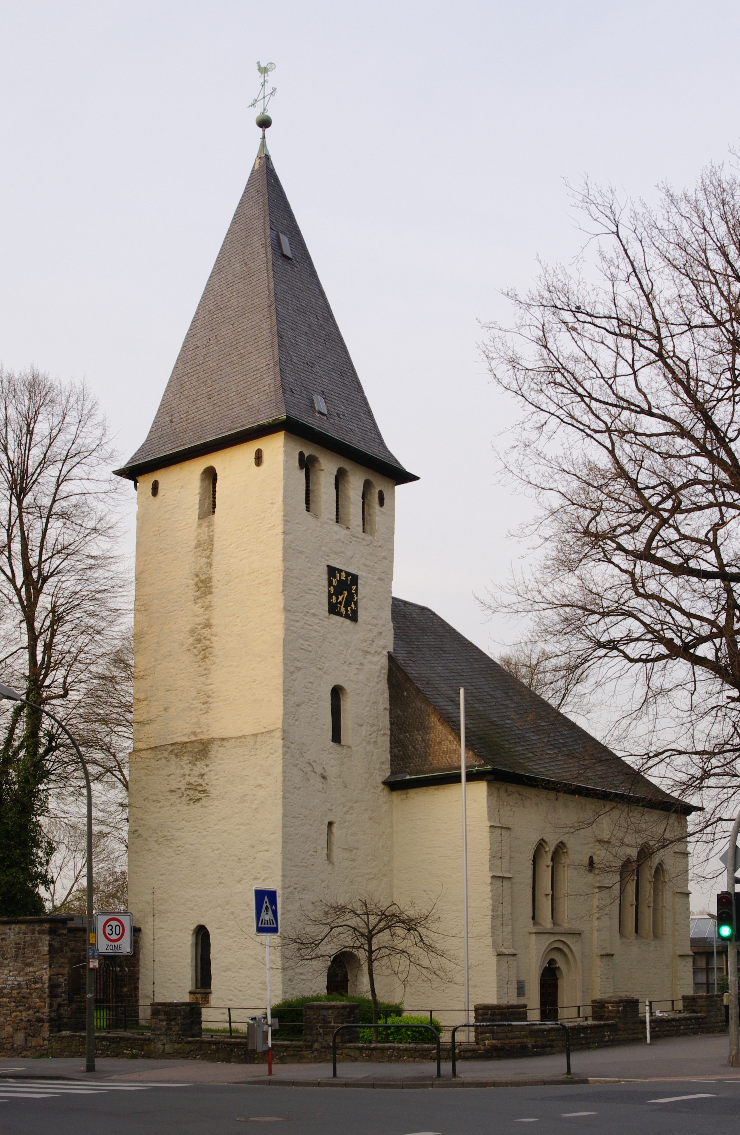 Ev. Kirche in Dortmund WickedeThis is a photograph of an architectural monument. 0281